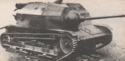 Czołg TK przezbrojony doświadczalnie w 20 mm działko automatyczne Solothurn [opis oryginalny]